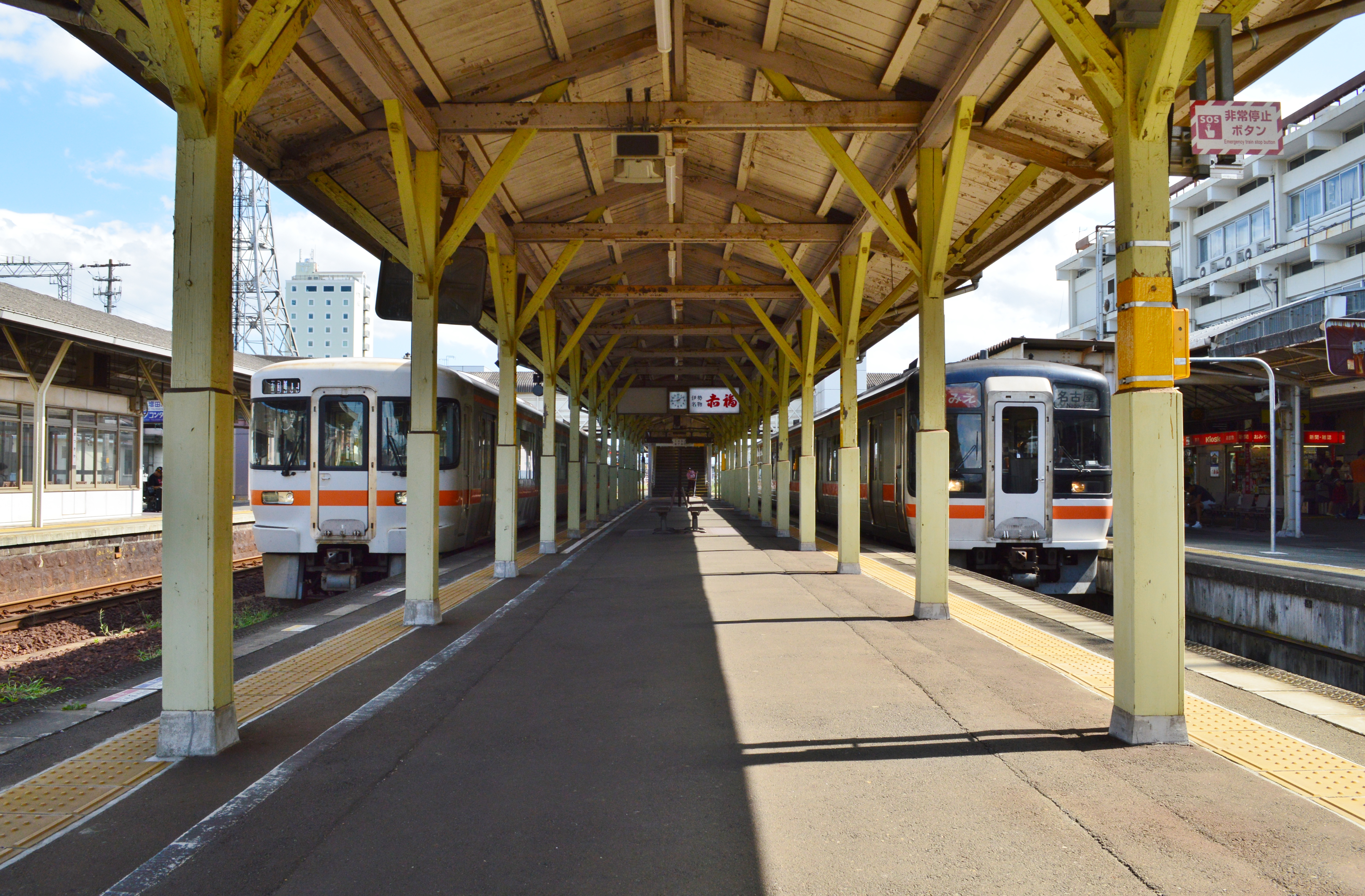 松阪駅 2番・3番ホーム